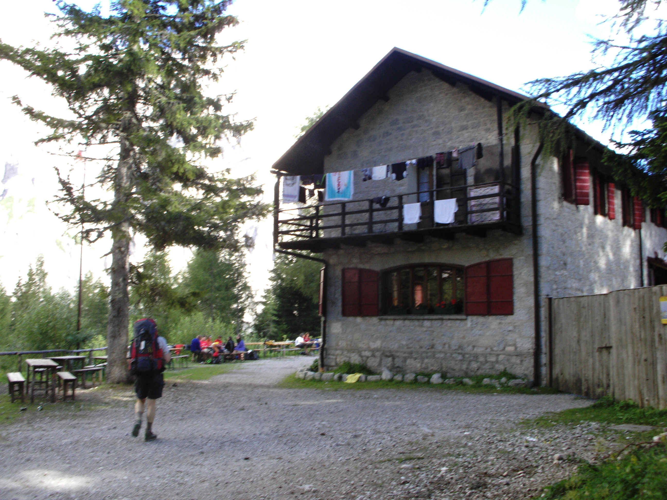 Rifugio Mario Vazzoler, sul Monte Civetta